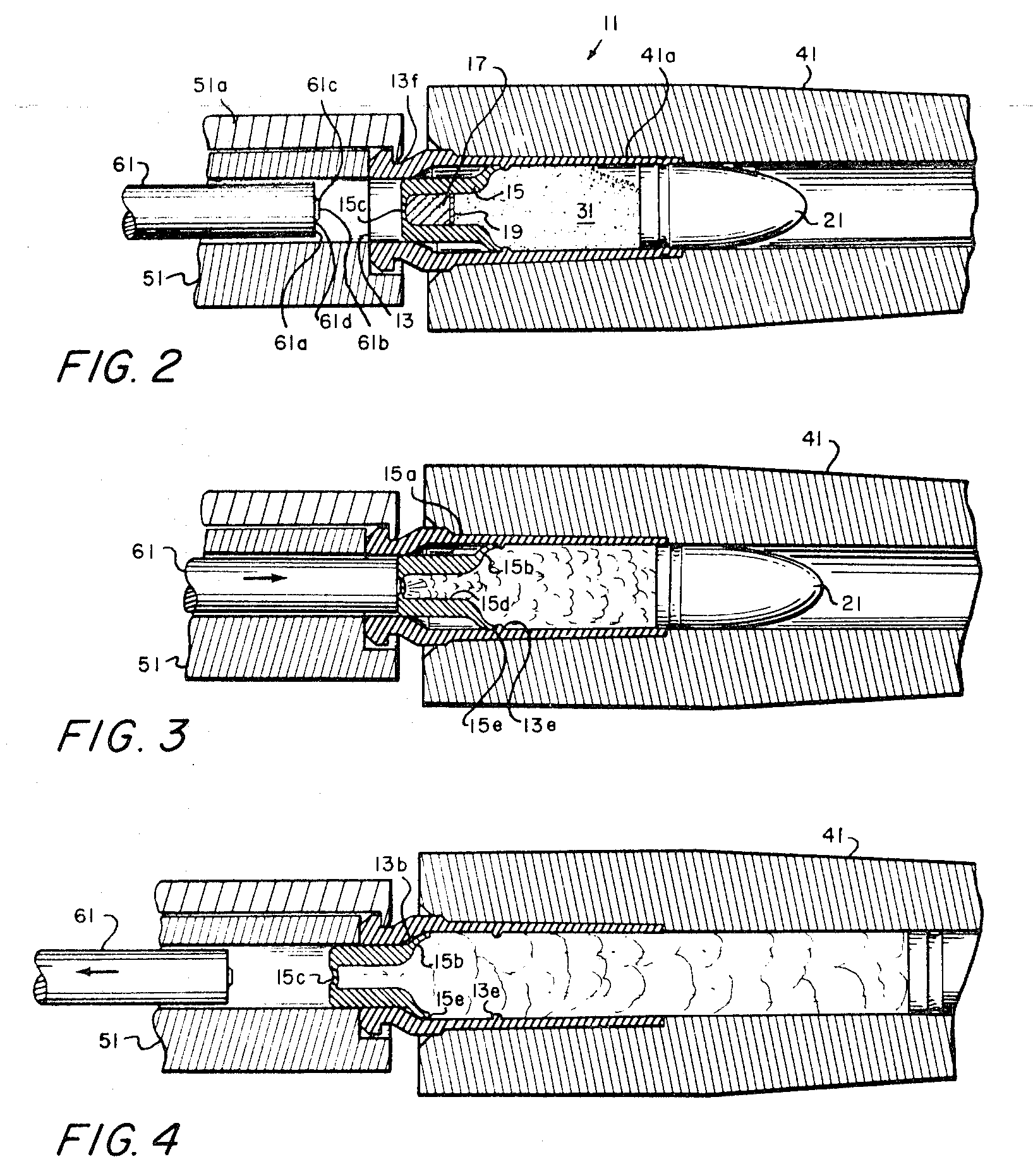 Patentzeichnung des Kolbenzündhütchens